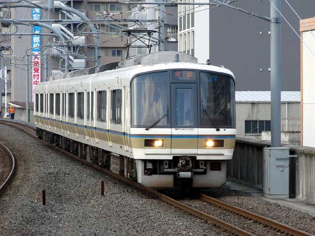 嵯峨野線を走行する221系電車